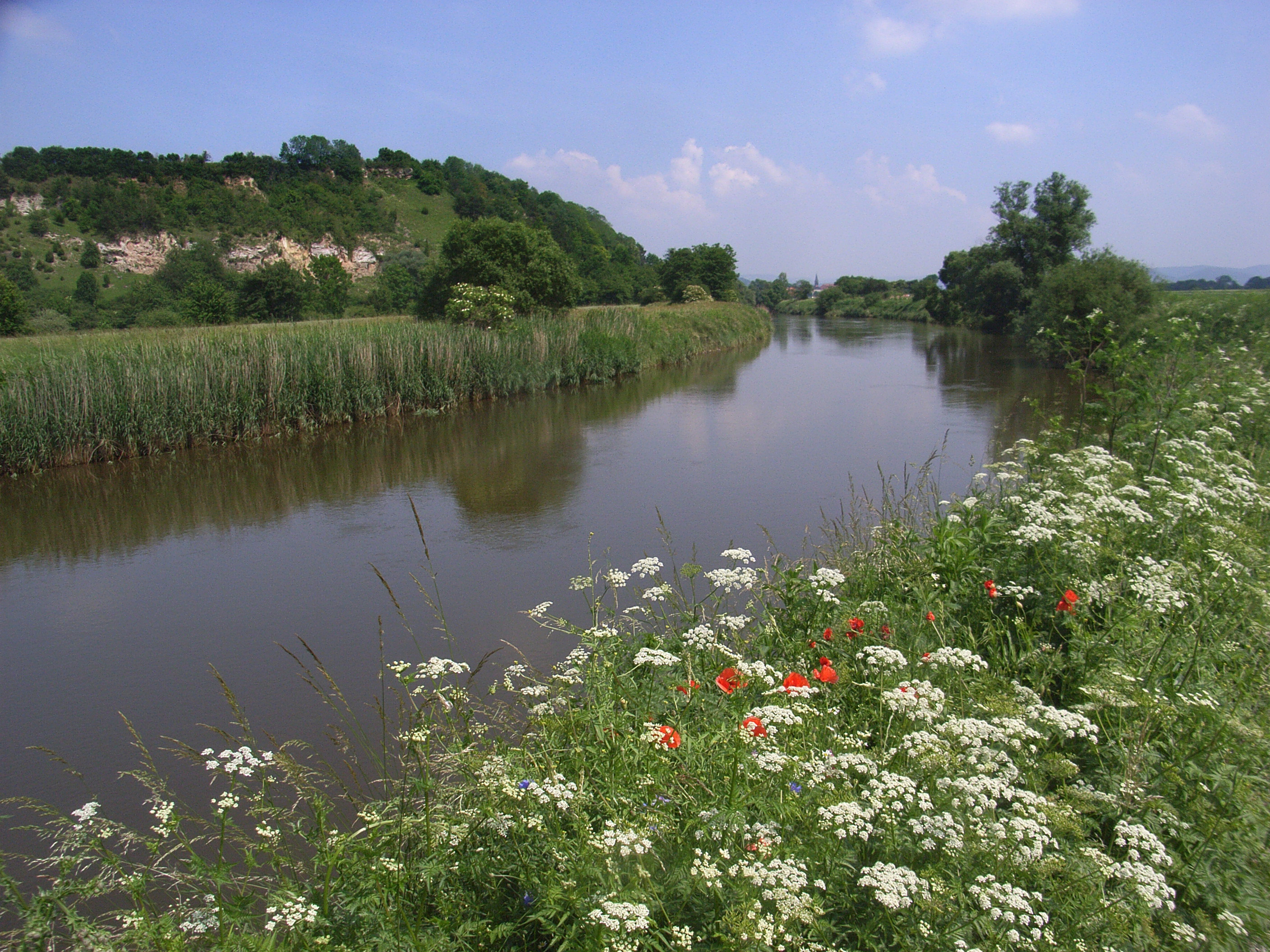 Werra und Naturschutzgebiet Jestädter Weinberg, WDPA ID 82016. Blick in Richtung Eschweger Becken.